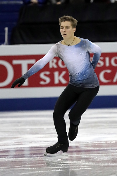 Эндрю Торгашев (США) на финале юниорского Гран-при 2017-2018